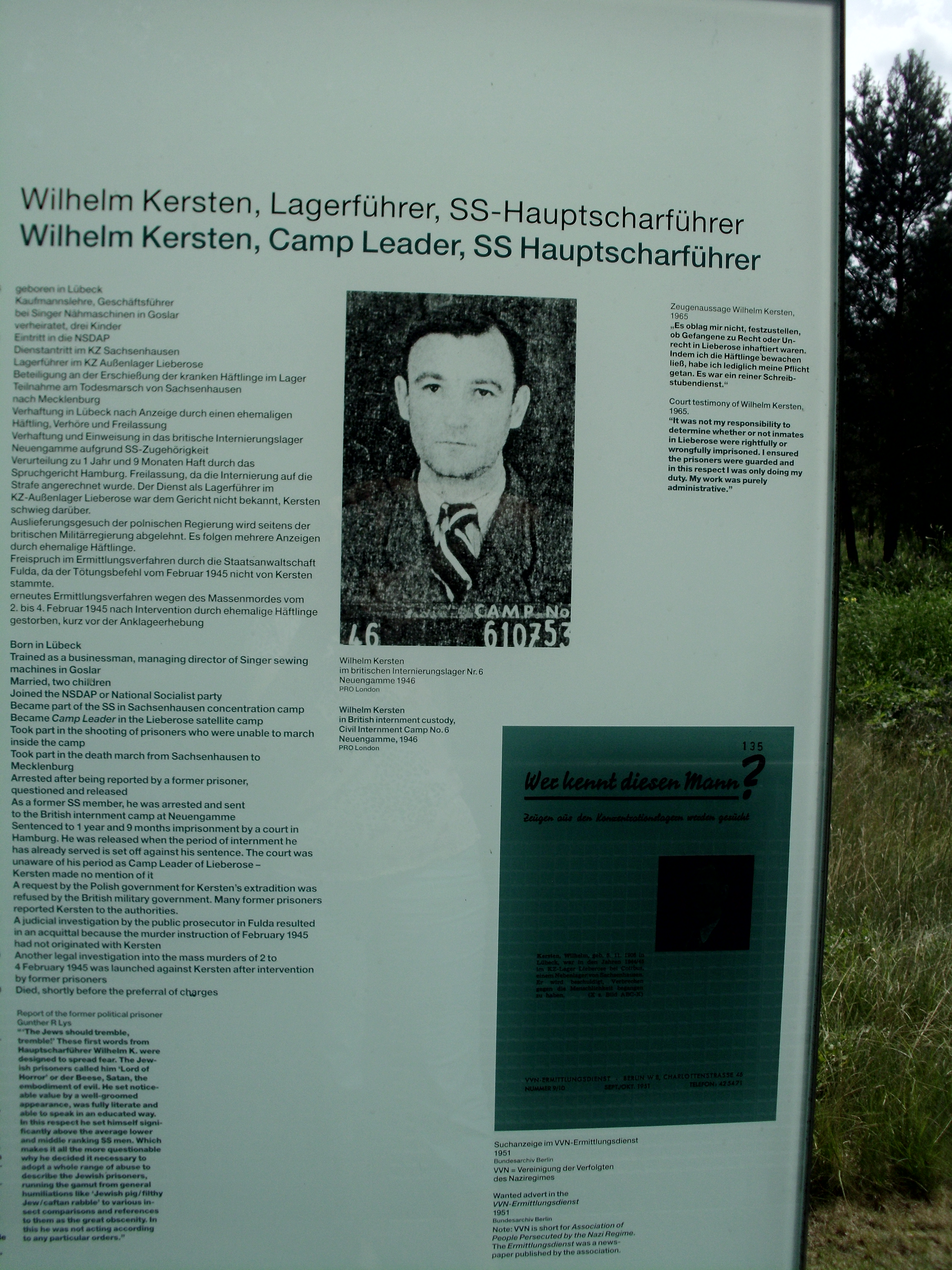 Lagerleiter Wilhelm Kersten (SS-Hauptscharführer), Jamlitz, Brandenburg, Germany, Tafel der Gedenkstätte Jamlitz